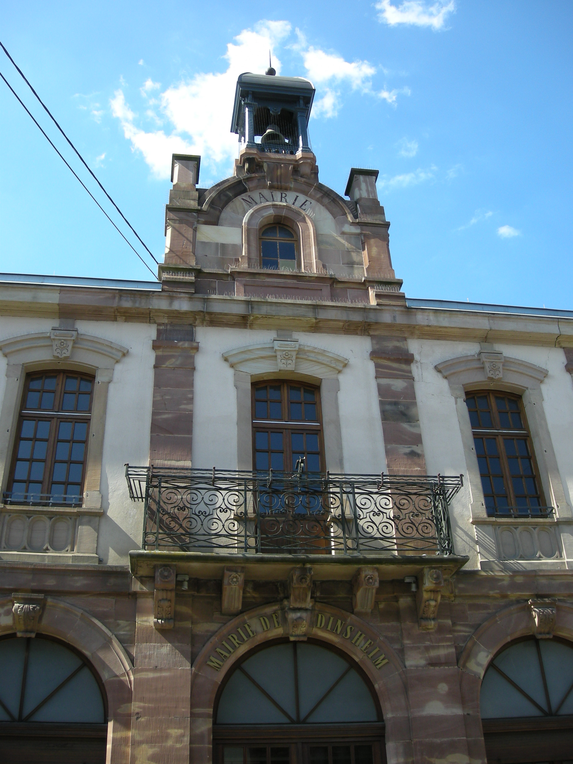 Le clocher de l'Hôtel de Ville à Dinsheim-sur-Bruche (Bas-Rhin)